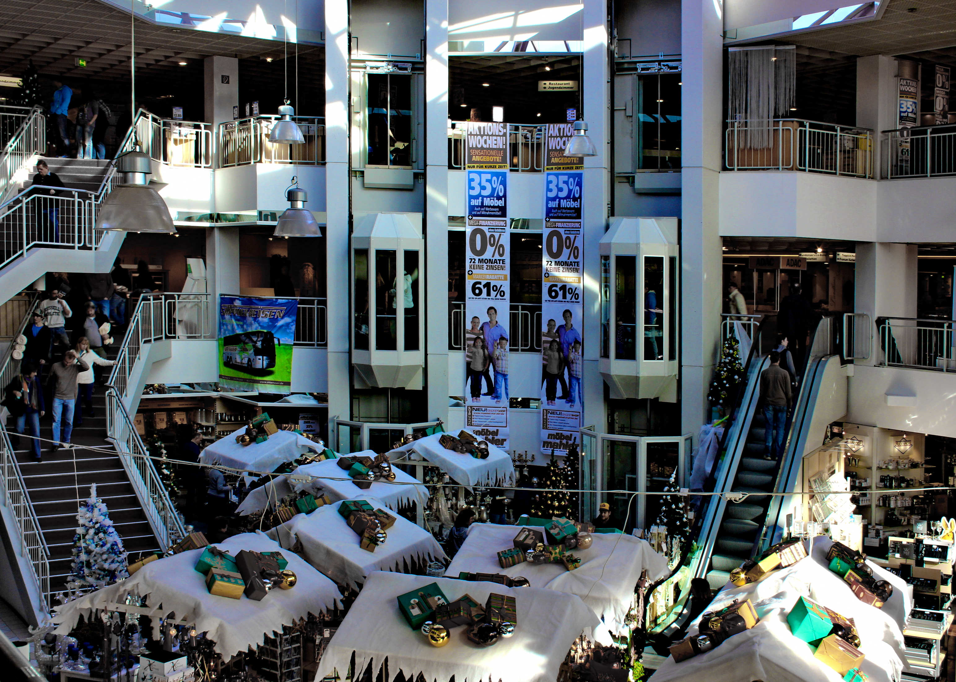 Möbel Mahler in Wolfratshausen für Weihnachten dekoriert.